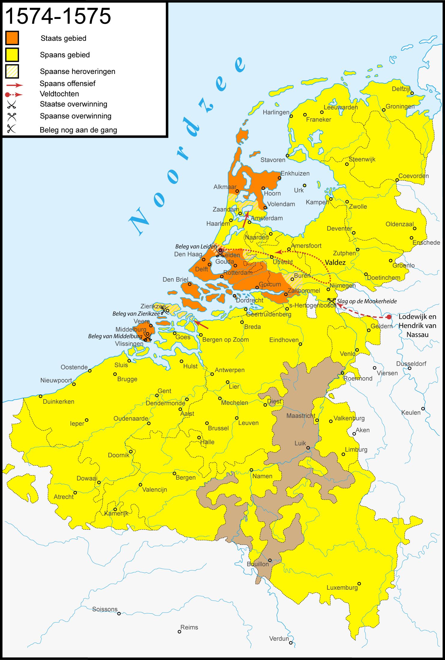 Krijgsbewegingen in de Tachtigjarige Oorlog: 1573. Nederlandse versie Engels: Warprogression in het Eighty Years' War: 1573. Dutch version